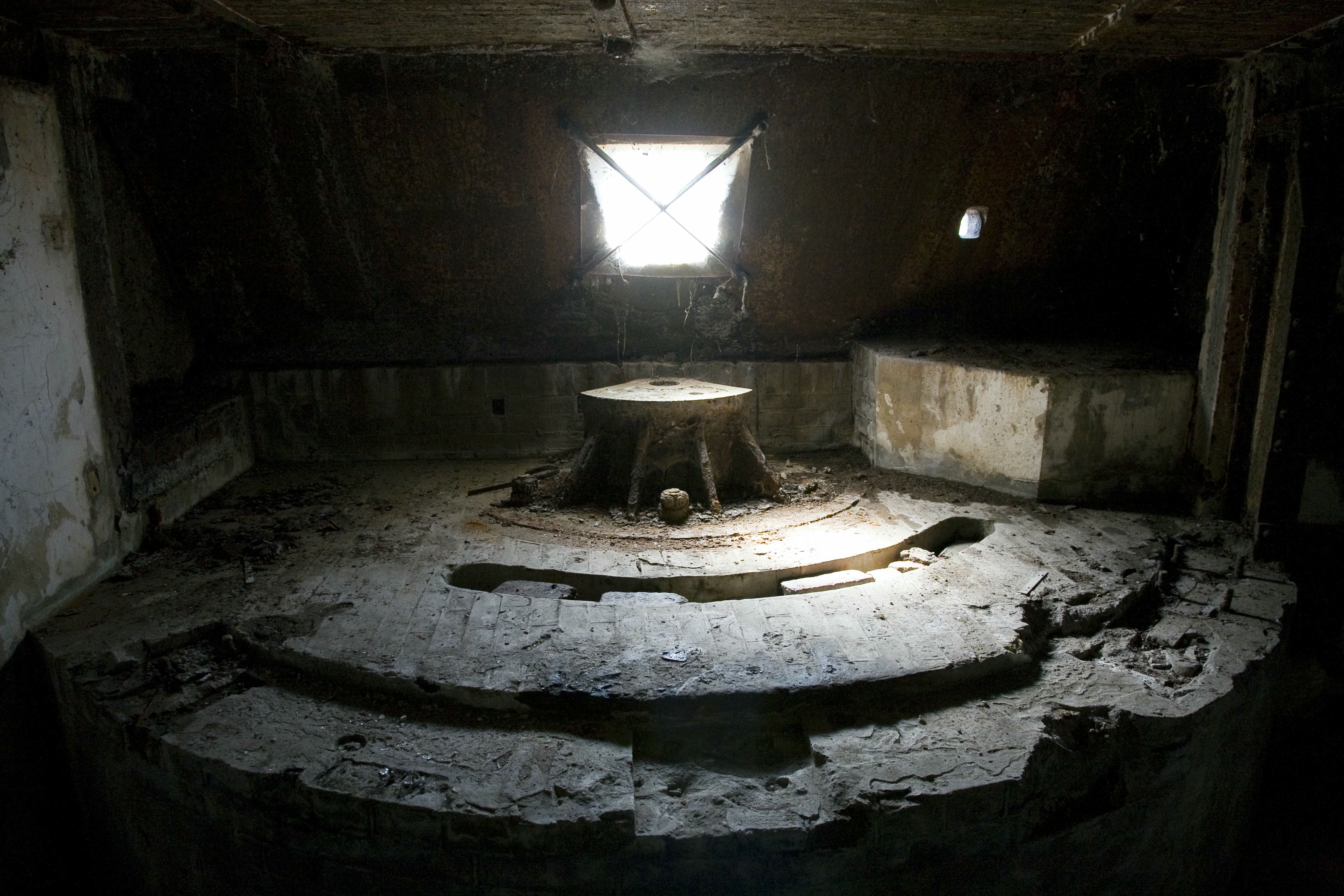 Fort Pannerden: Interieur van een kanonaffuit (opmerking: Publicatie: TRAP Pannerdensch Kanaal (Cultuurhistorische Routes in Nederland - 58))